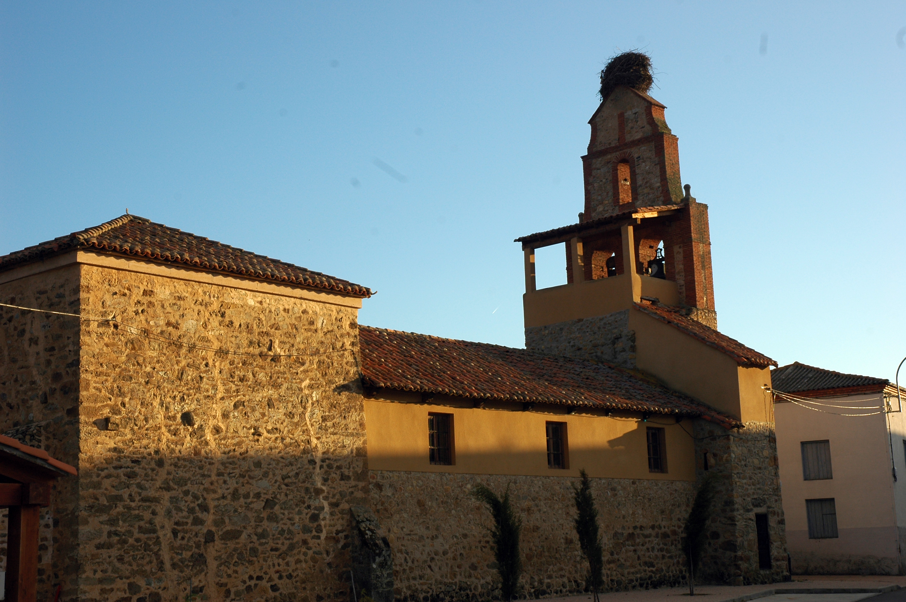 La Iglesia de Santiago del Molinillo (Leon, España) al atardecer